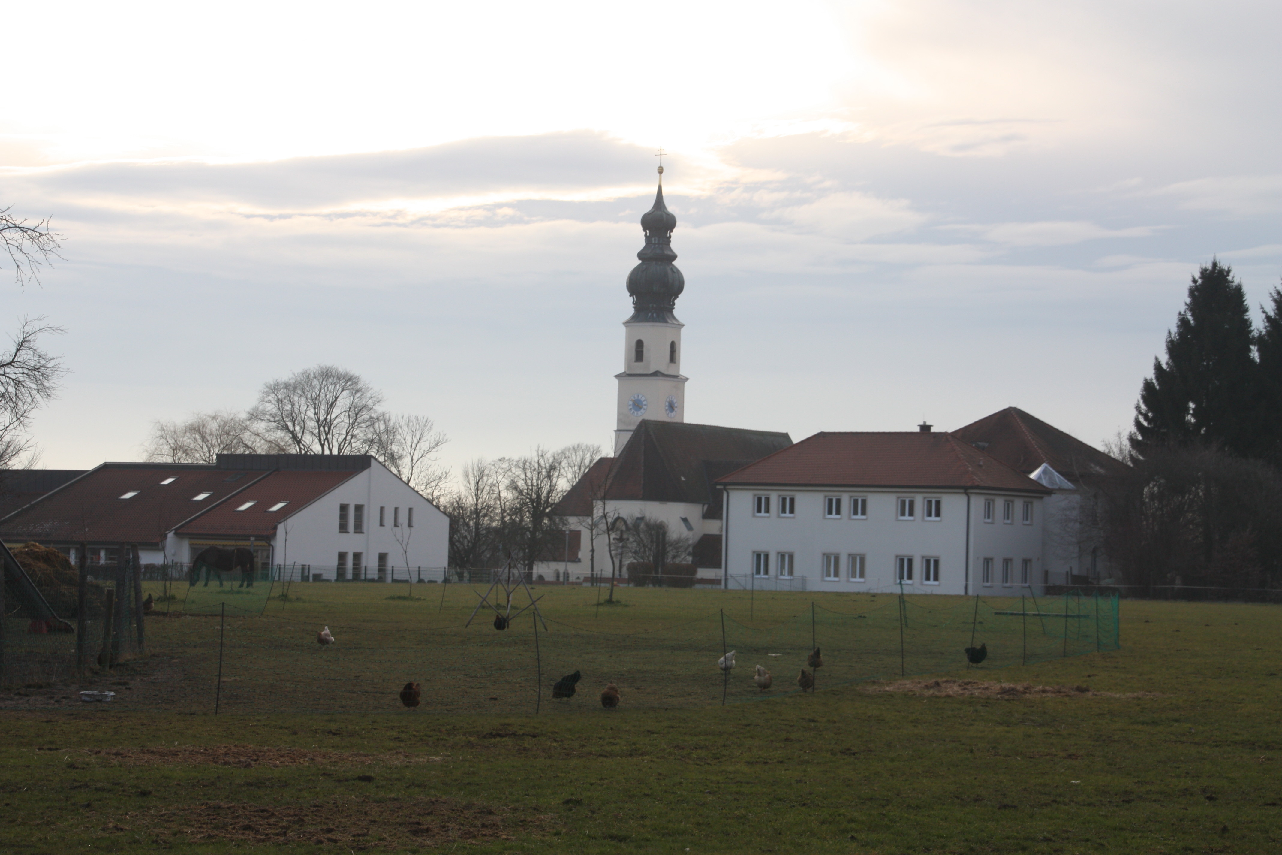 Kastl (Upper Bavaria)